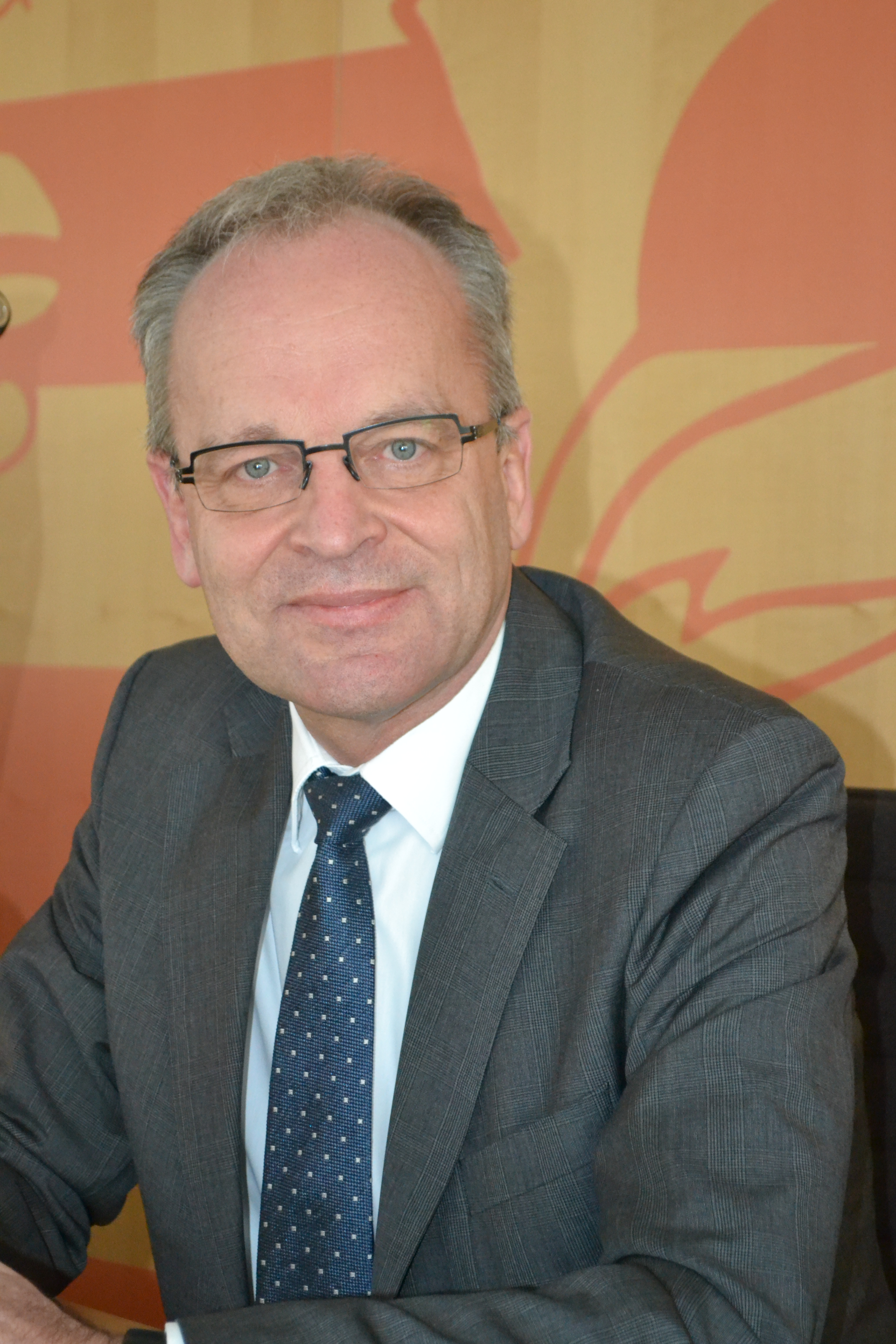 Hessischer Landtagsdirektor Peter von Unruh